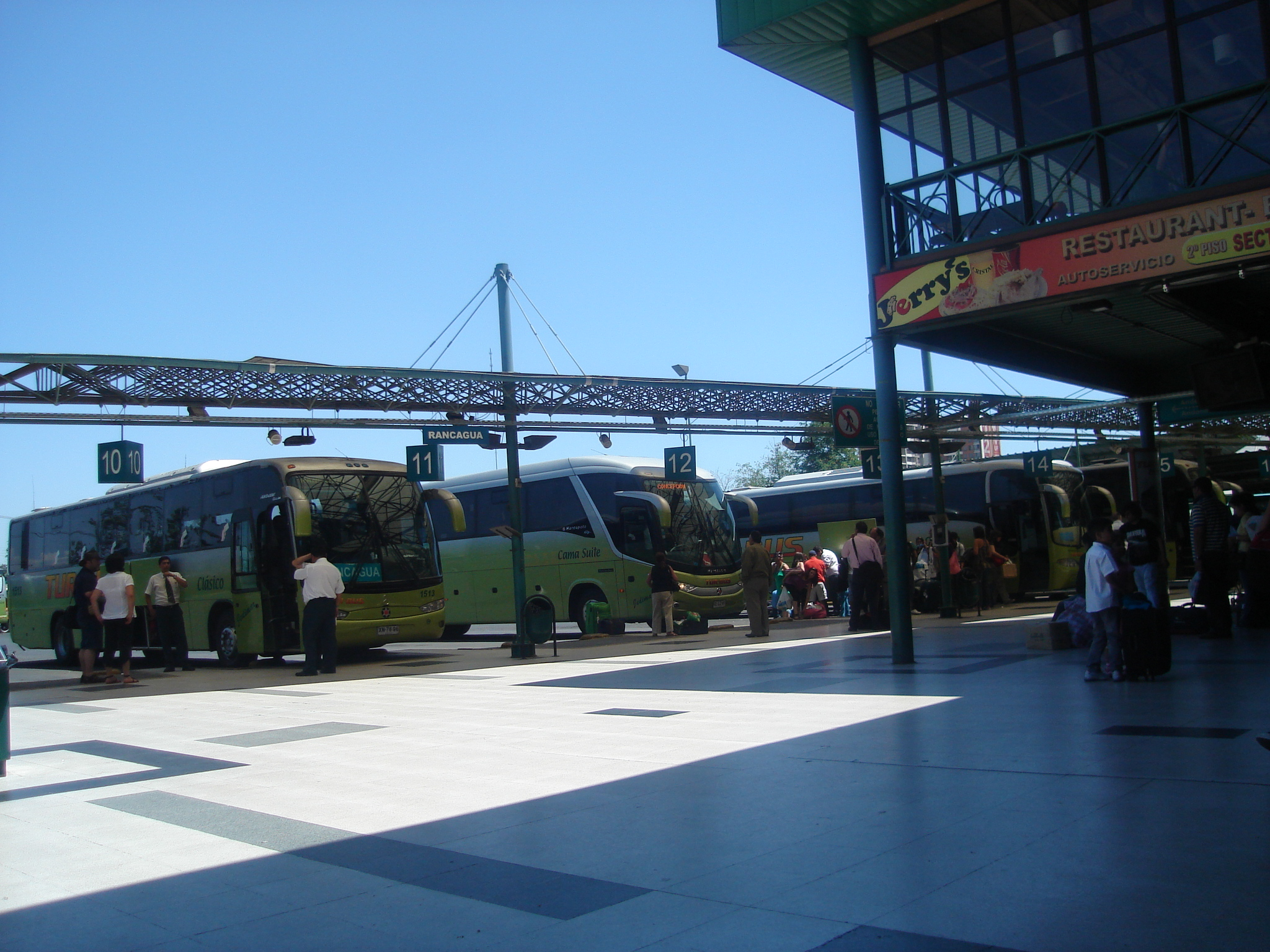 Terminal Alameda, terminal de autobús de Santiago de Chile.